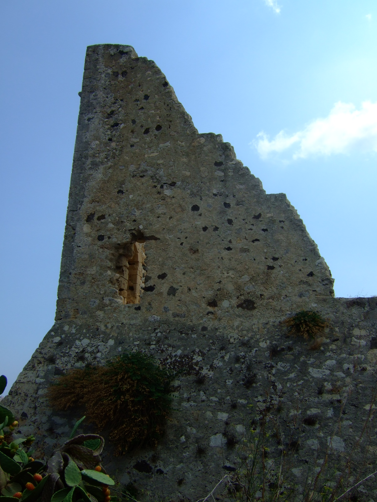 Torre Scibini (o Xibini) nei pressi di Pachino (Siracusa)